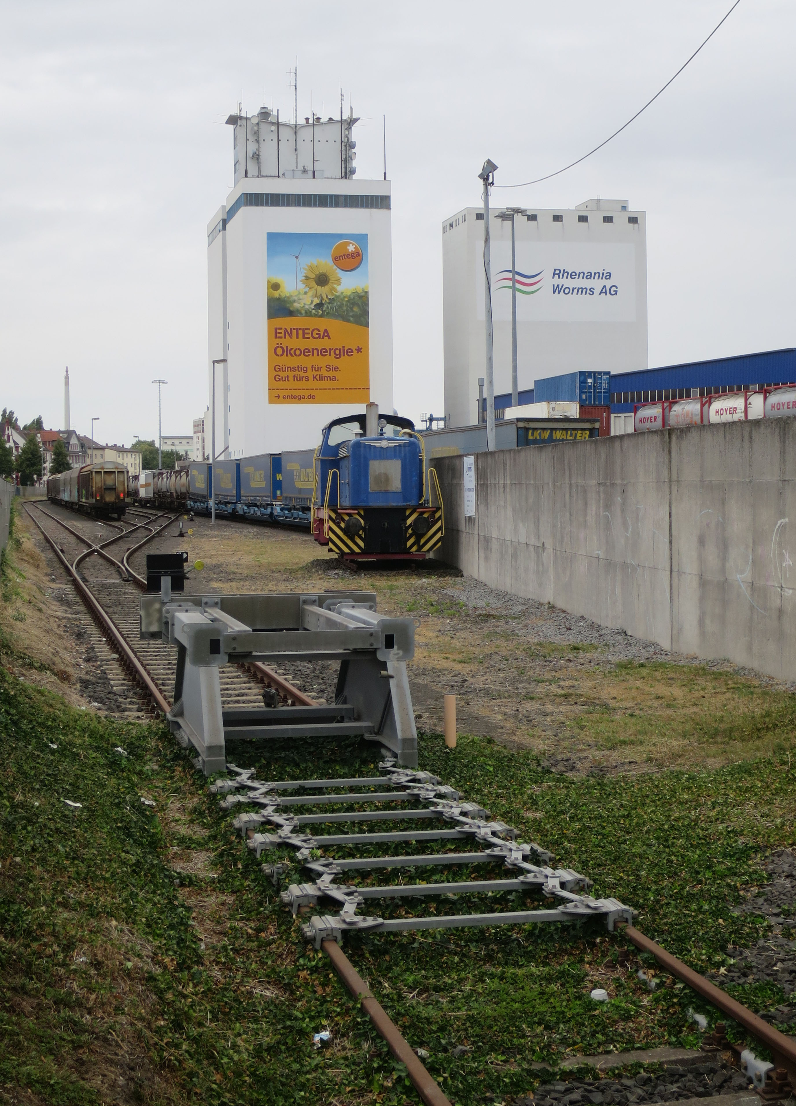 Ende des westlichen Gleisstranges der Hafenbahn Worms. Bildmitte: Denkmallokomotive "Lok 1".